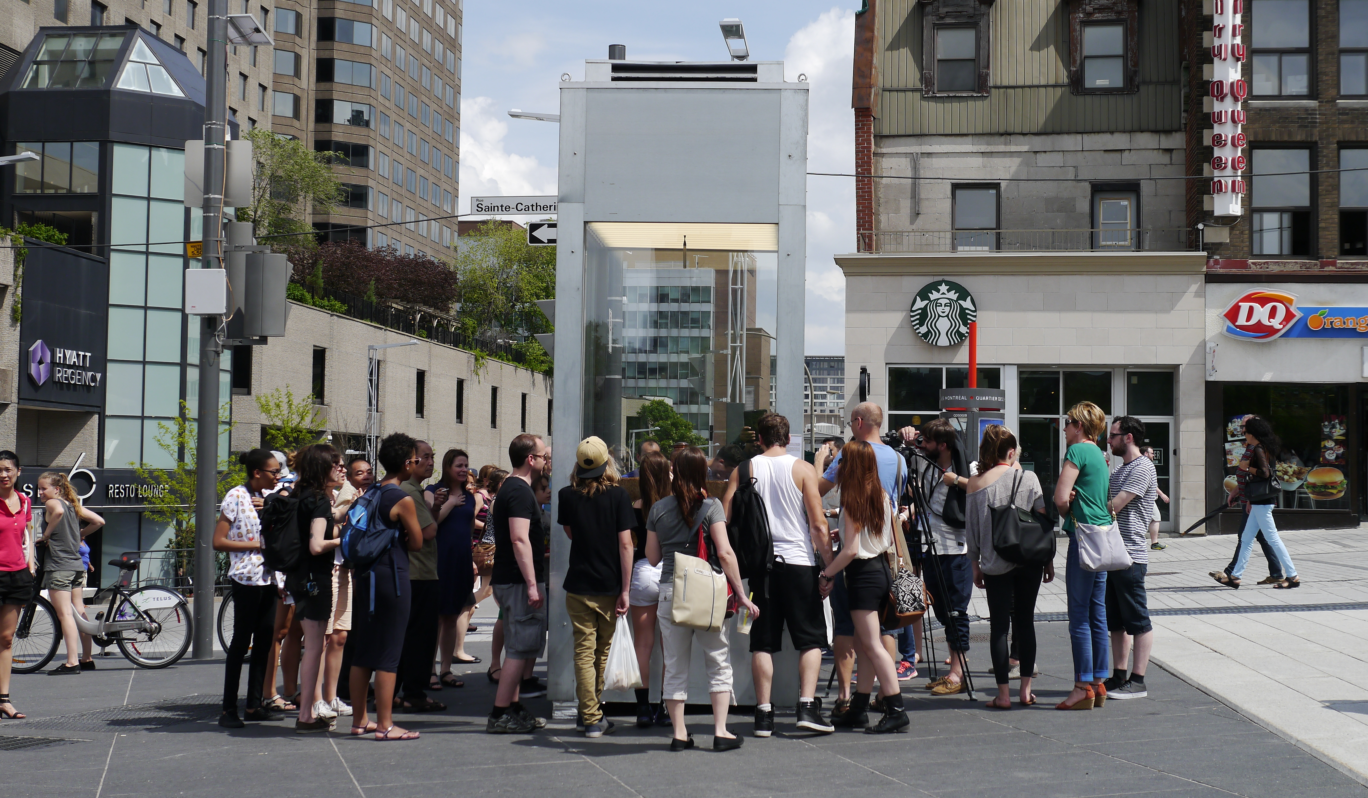 Place des festivals, Montréal CECI N'EST PAS… Une cage de verre. À l’intérieur, un tableau vivant change chaque jour. Des images potentiellement explosives bousculent sans détour nos tabous sociaux. 10 jours, 10 scènes, 10 douches froides. JOUR 10 (ÉPILOGUE) / Samedi 30 mai « CECI N’EST PAS MOI Historiquement au Québec, avec la prépondérance de la religion catholique, le culte funéraire était de premier plan dans la vie des fidèles. Depuis quelques années, le milieu funéraire est bouleversé par le recours de plus en plus fréquent à l’incinération. Plus de 60 % des corps sont maintenant réduits en cendres après le décès. La mort est aujourd’hui peu visible dans la société. Veufs et veuves ne sont plus identifiables dans la rue et les enterrements sont rarement annoncés par le son des cloches des églises. La visite au cimetière n’est plus un rituel courant. De manière générale, l’expression publique de tout sentiment de tristesse ou de perte paraît déplacée. C’est également le cas pour tout signe de déclin, d’effondrement, de destruction. » DRIES VERHOEVEN Ludique et dérangeant D’abord reconnu en tant que scénographe, l’artiste Dries Verhoeven conçoit des œuvres à la frontière du théâtre et de l’installation. Ses spectacles et ses événements sont présentés autant dans les musées que dans les espaces publics de la ville. Ses œuvres interrogent constamment la relation entre la vie et l’art, entre ceux qui créent et ceux qui regardent, offrant des angles de réflexion différents et cherchant à susciter réactions et débats. Le spectateur, pris à partie, doit prendre position sur ce qui surgit devant lui. Rien de tiède